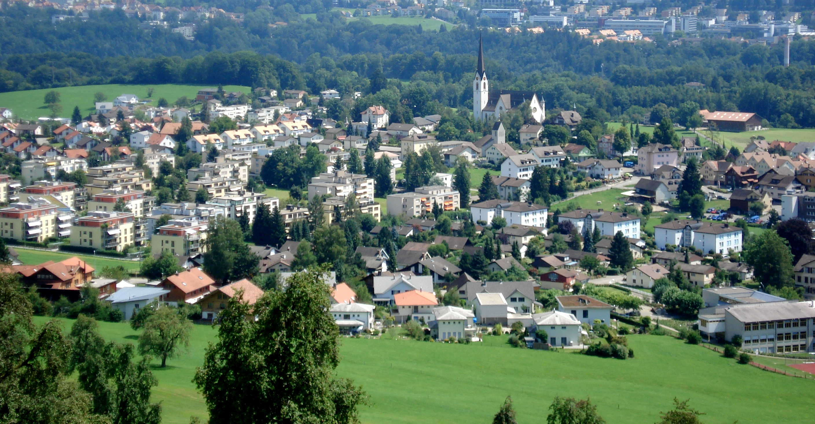 Abtwil St.Gallen Switzerland